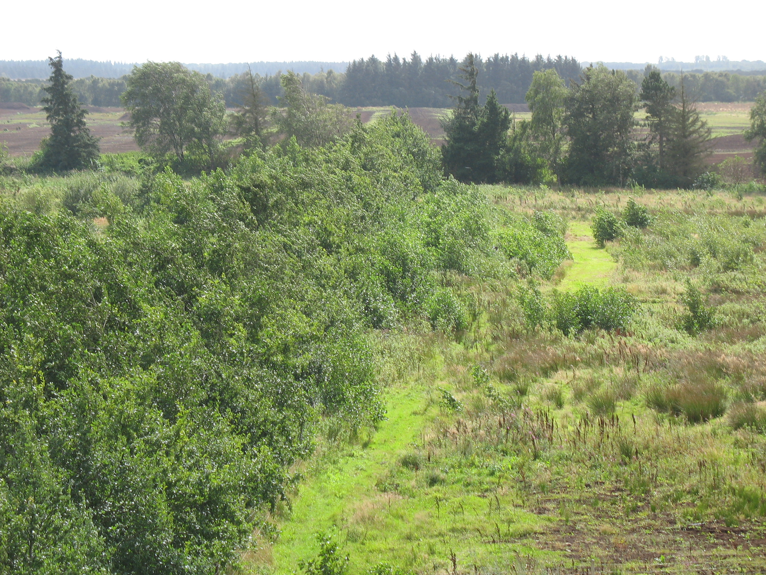 Udsigt over den centrale del af Lille Vildmose. Lille Vildmose.